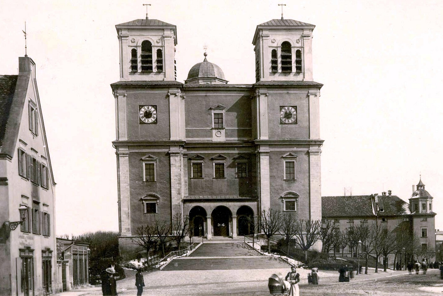 Ursprüngliche Turmform